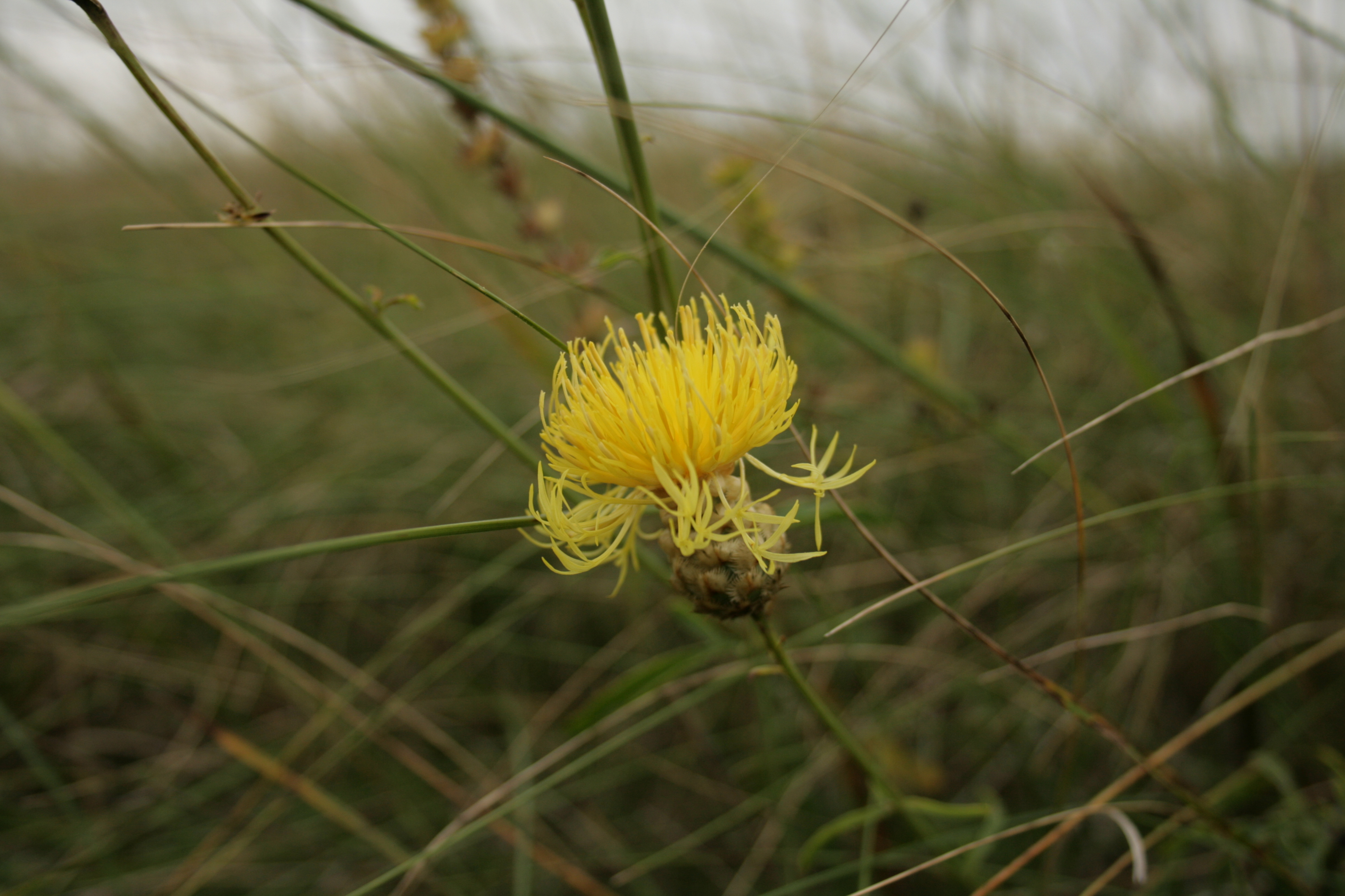 Ютановское городище. Василек восточный (Сentaurea orientalis)